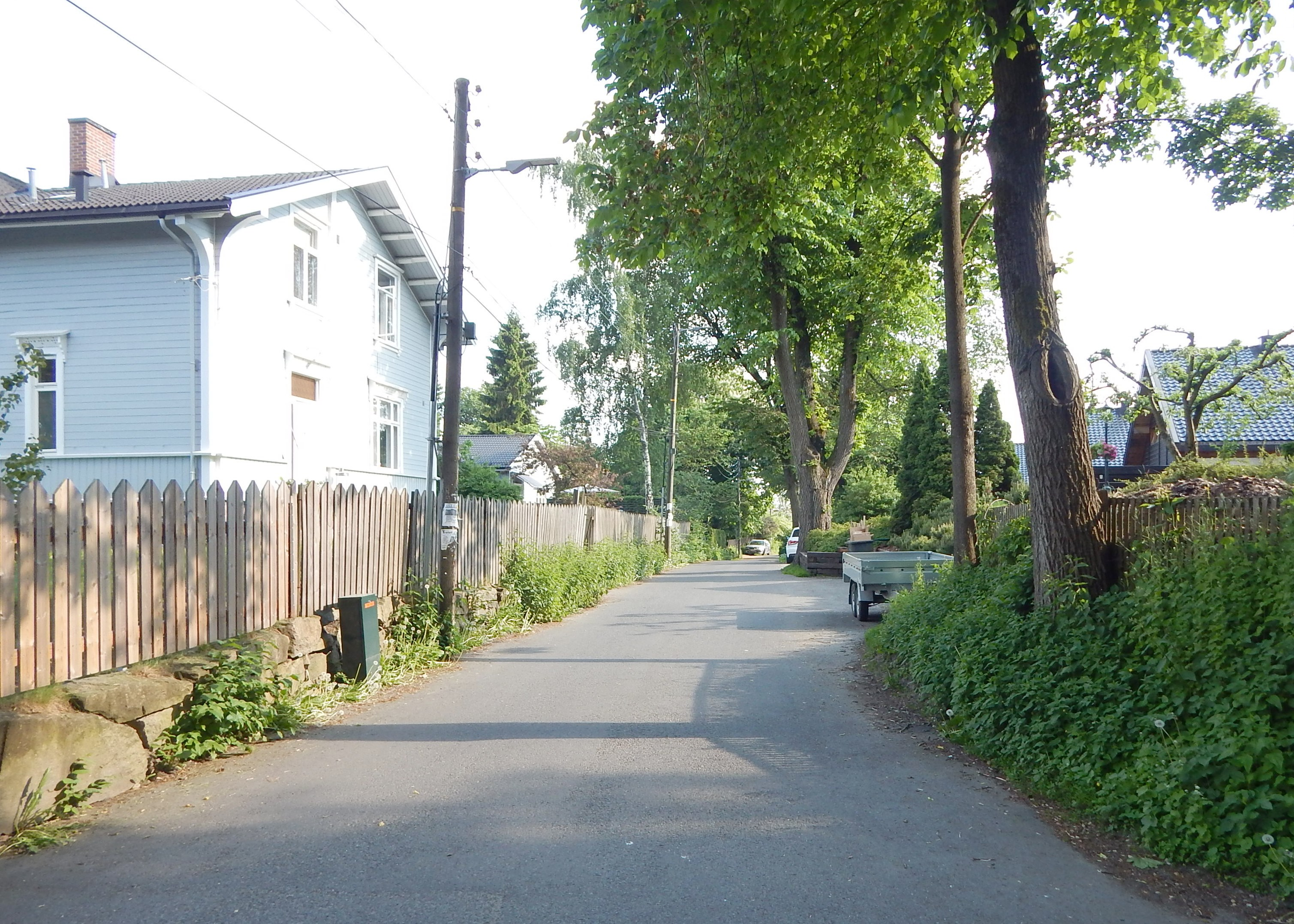 Vennersborgveien sett fra Bestumveien